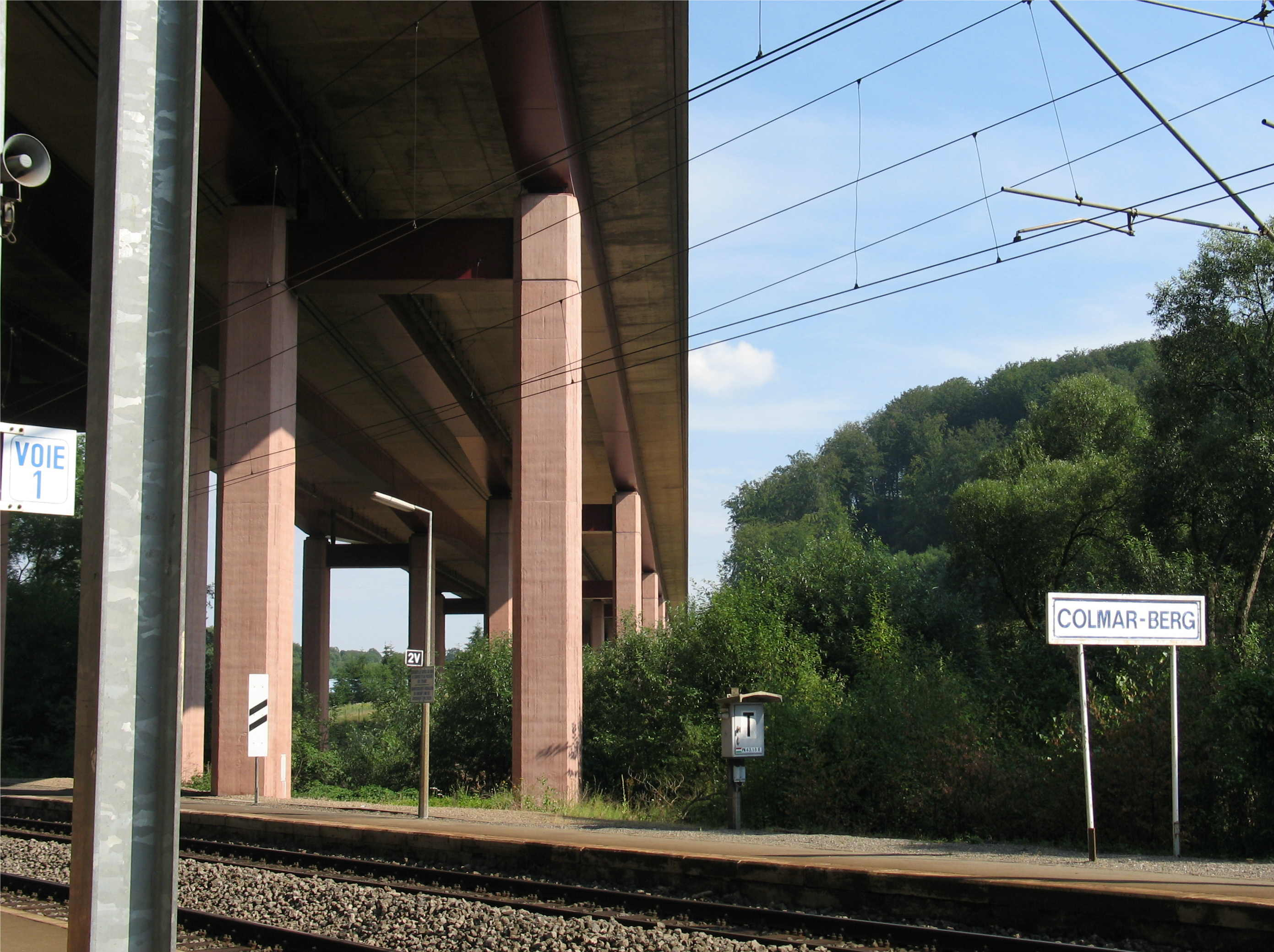 Op der Gare vu Colmer-Bierg